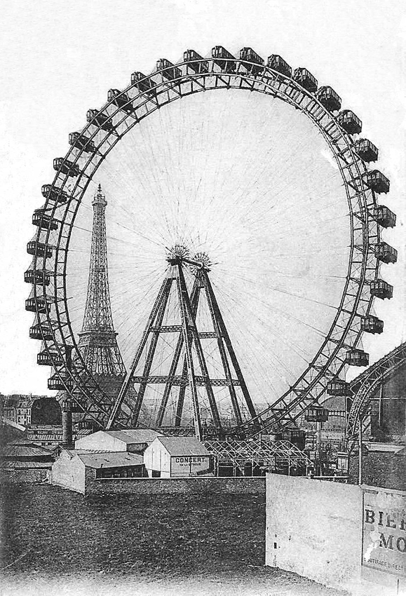 La Grande Roue pour l’exposition universelle du 1900 en Avenue de Suffren